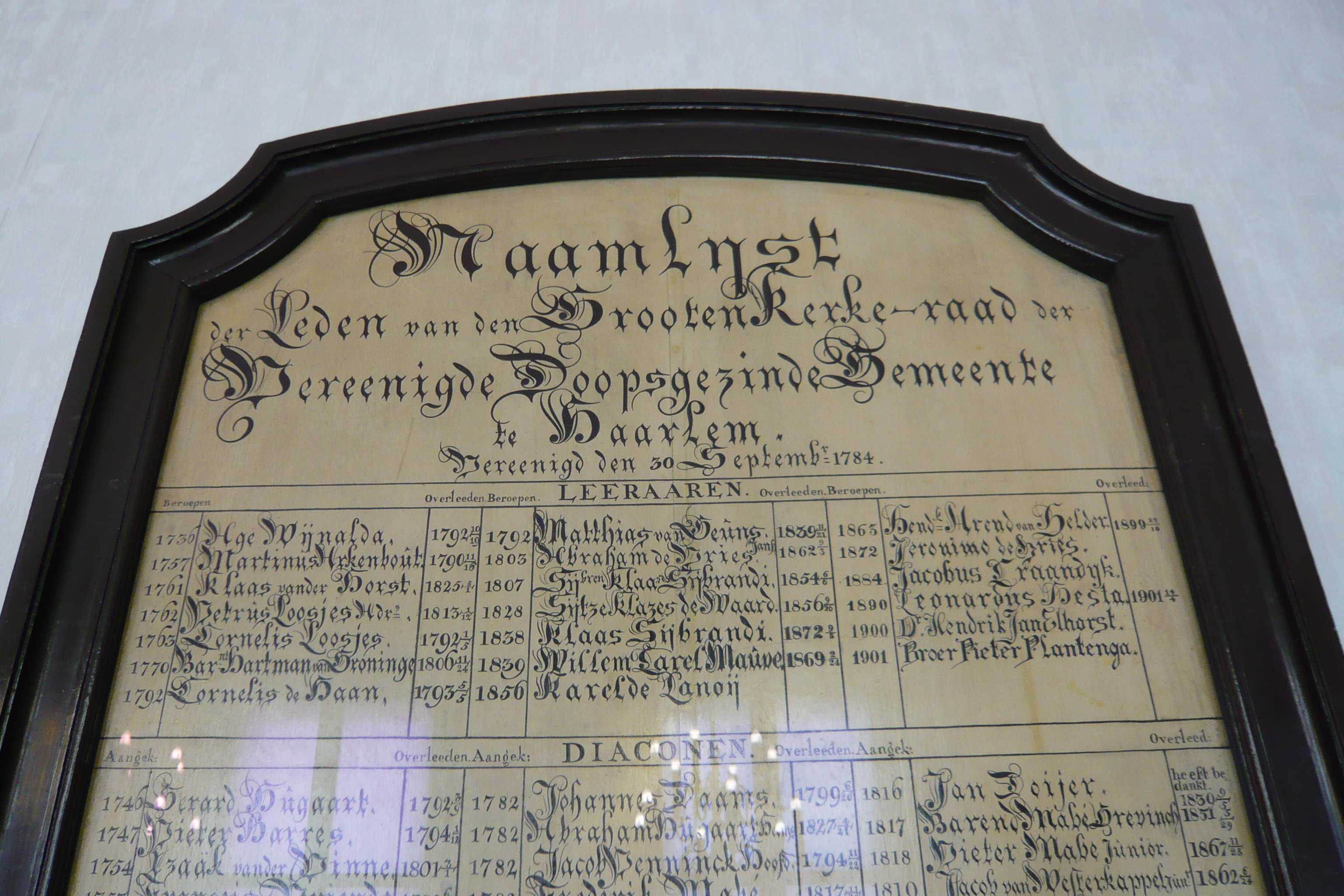 Doopsgezinde kerk, Grote Houtstraat & Peuzelaarsteeg & Frankestraat, Haarlem Naamlijst